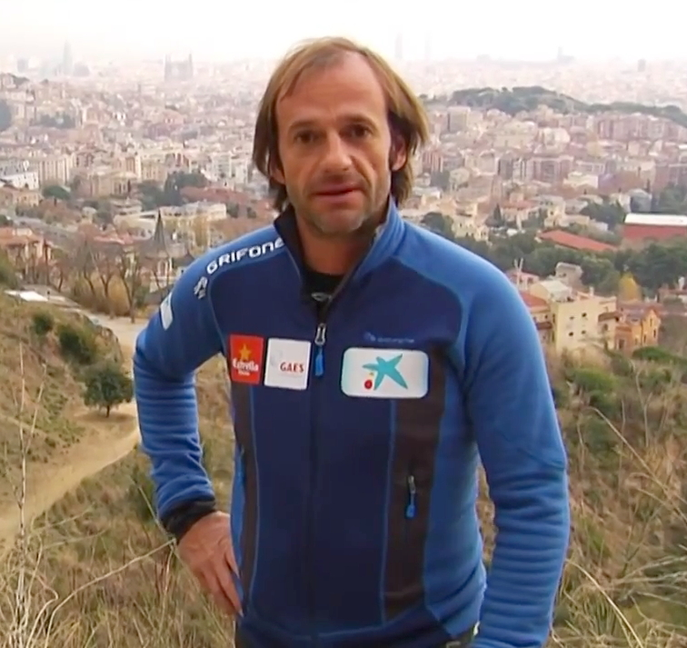 Ferran Latorre, alpinista